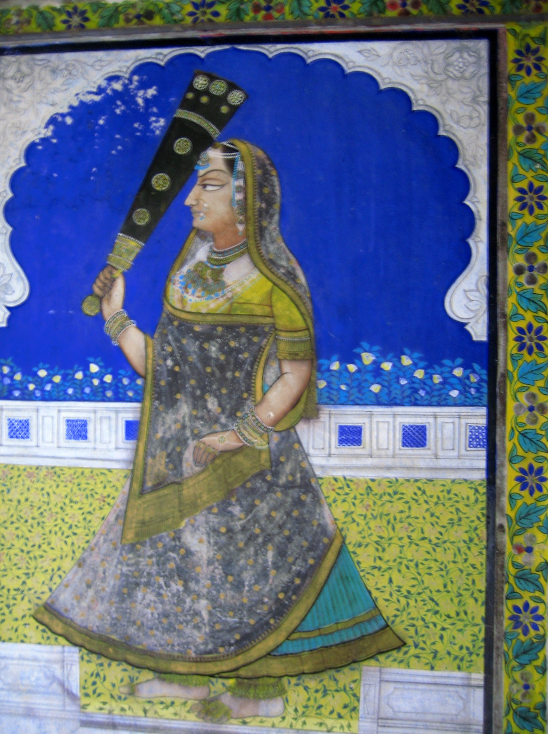 Wandmalerei im Haveli Juna Mahal, Dungarpur.